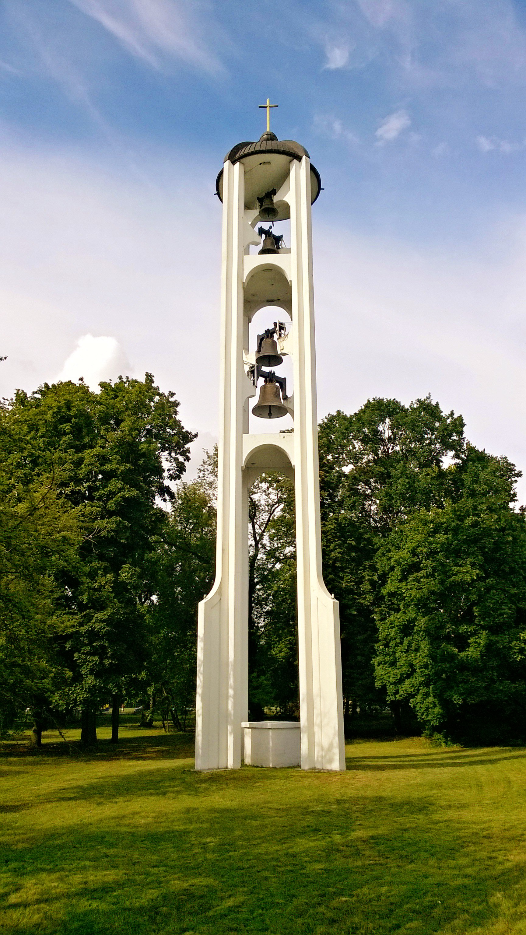 Kościół Chrystusa Króla w Toruniu1